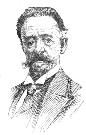 Lorenzo Delleani